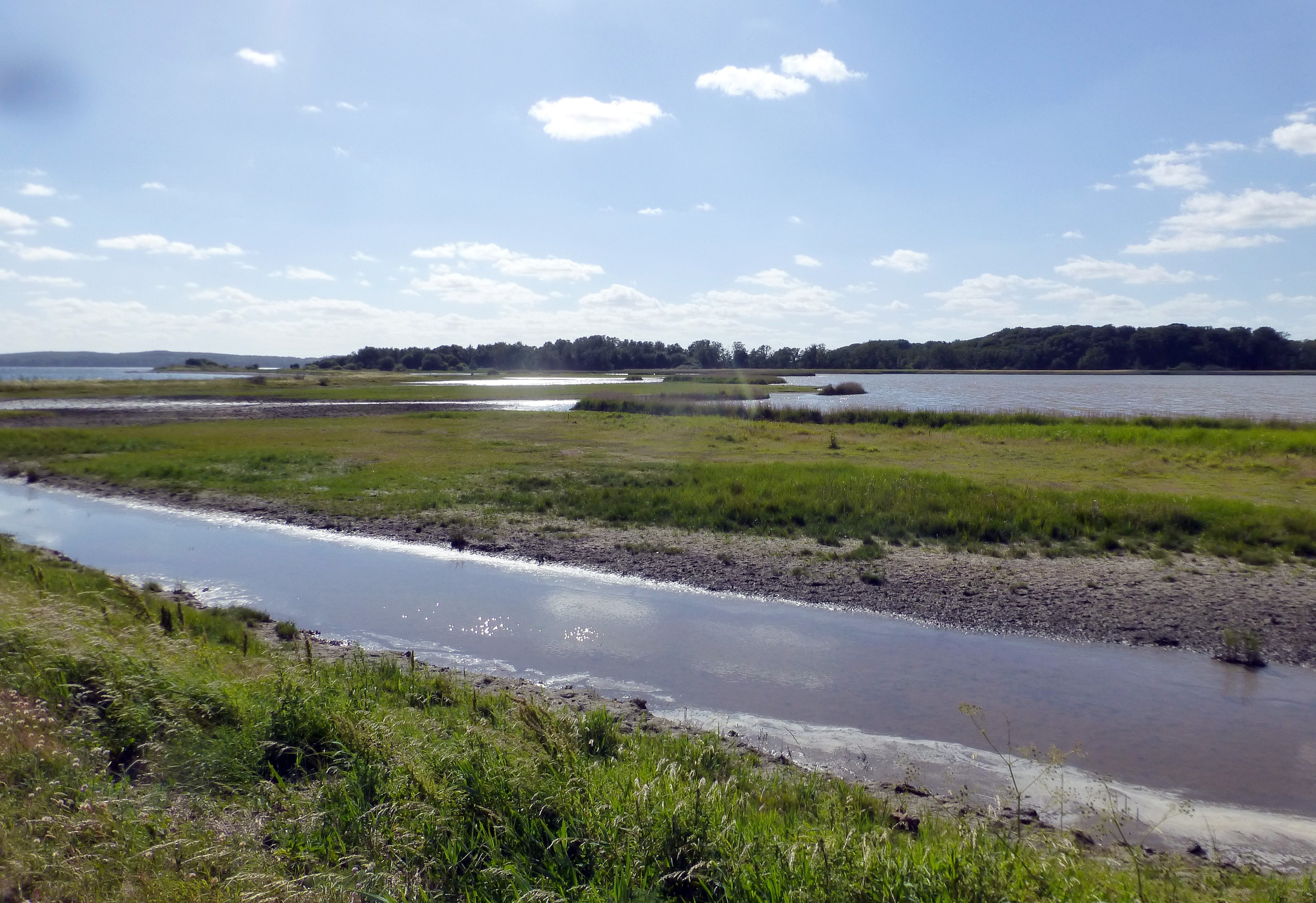 Østerø- Knudshoved set mod sydvest